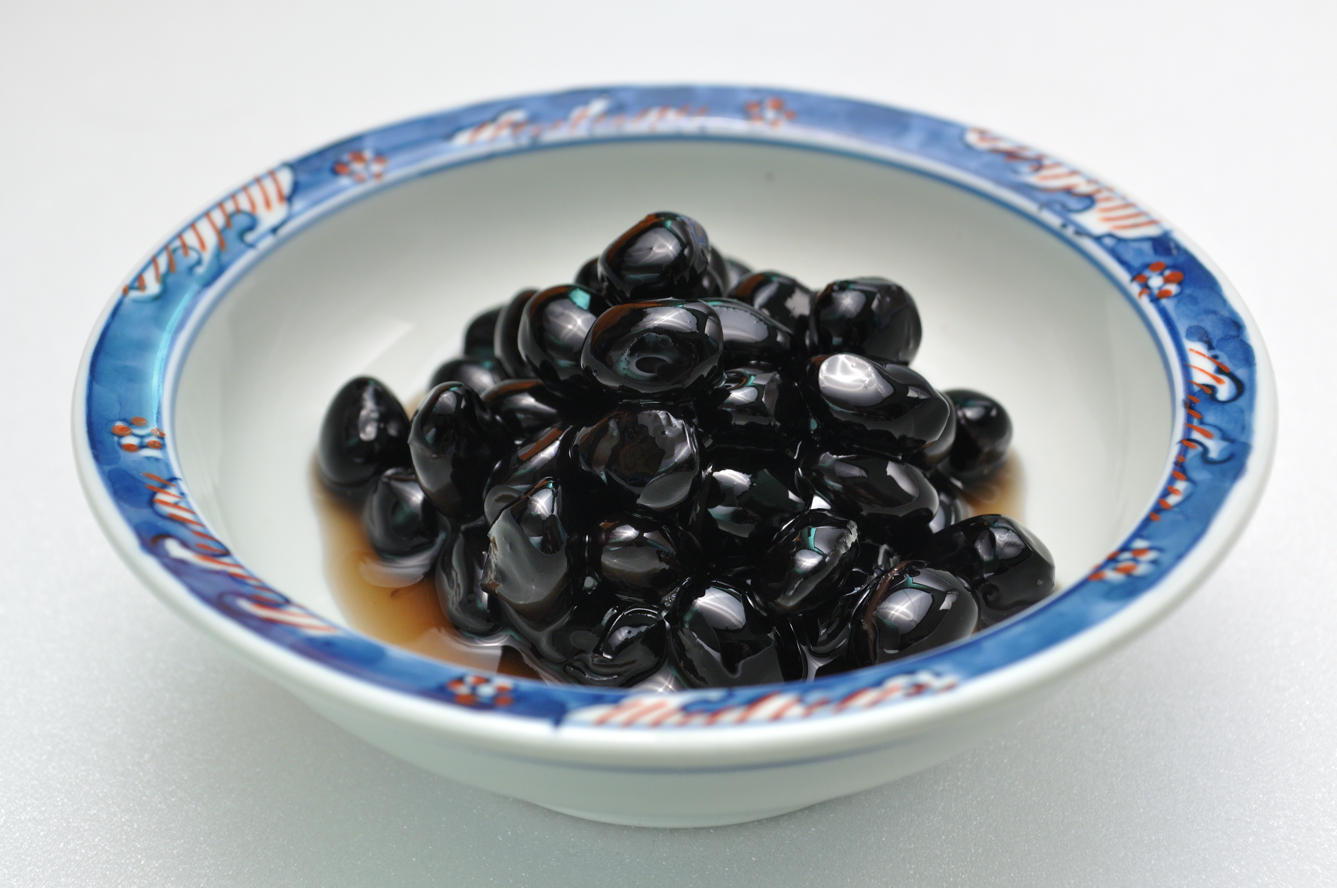 おせち料理の黒豆